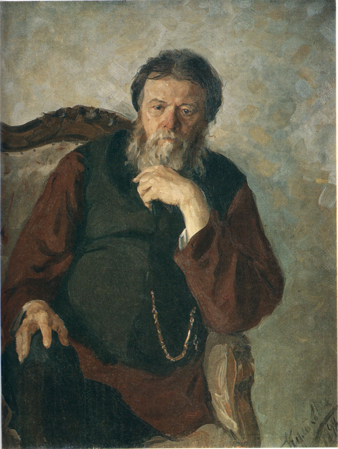 Куликов И.С. Портрет отца, 1898